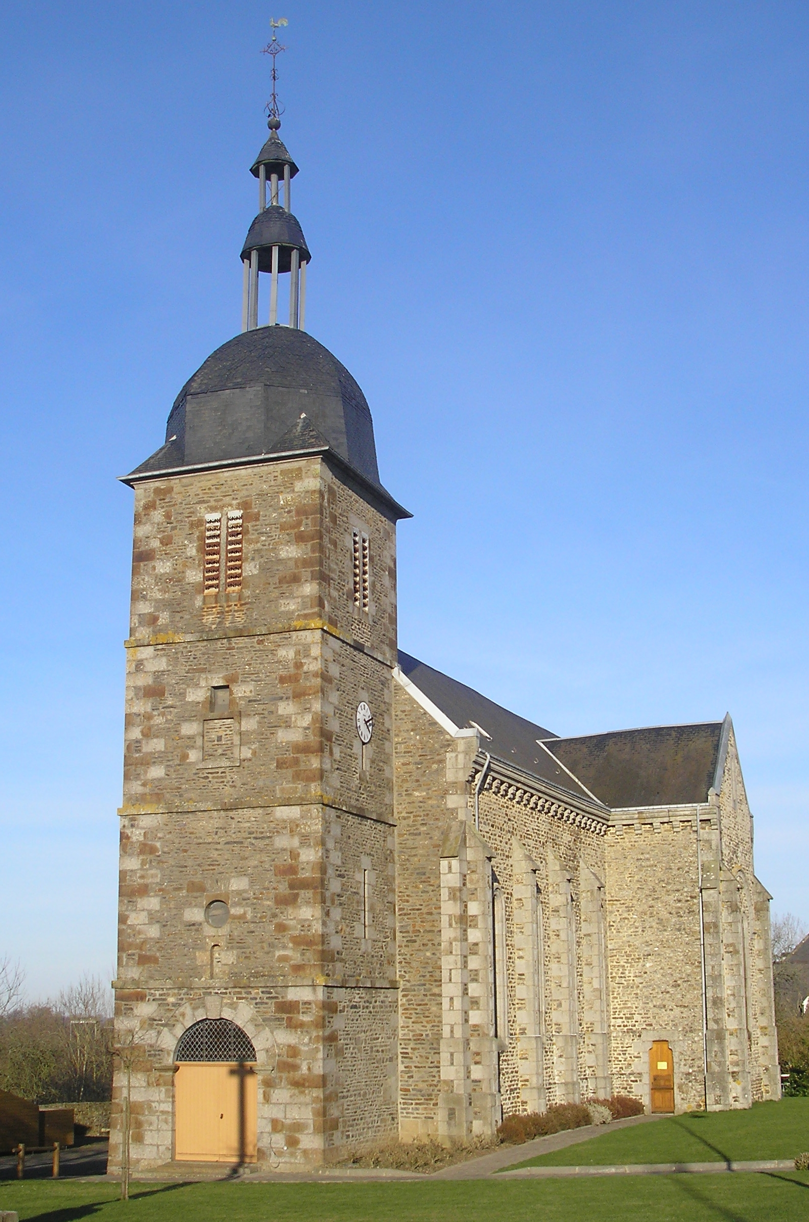 Saint-Quentin-les-Chardonnets (Normandie, France). L'église.